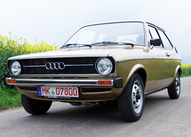 Audi 50 GL Vorführwagen aus der 1. Septemberwoche 1974 Es ist der zur Zeit älteste Audi 50 GL mit der 1,1 Liter 60 PS HC Maschine. In hellas-Zweischicht-Metallic.